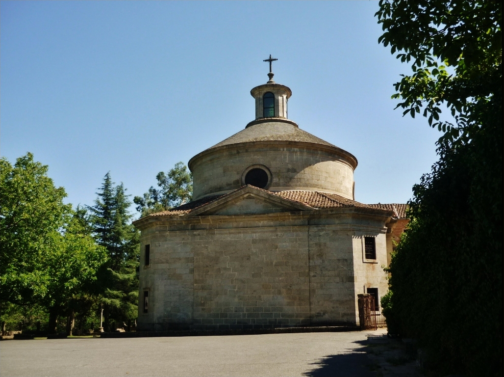 Santuario de San Pedro de Alcántara, Arenas de San Pedro, Ávila.